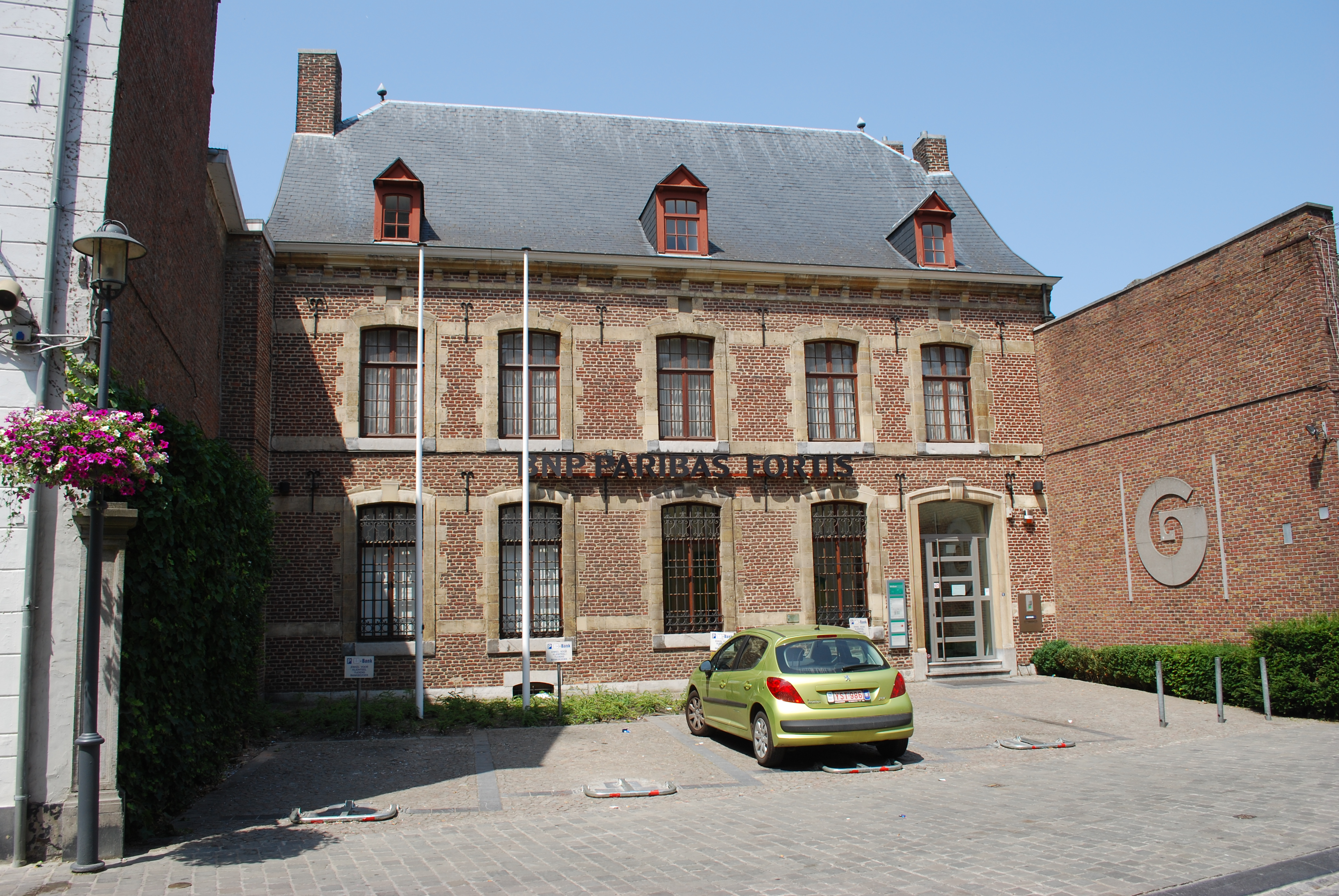 Maastrichterstraat à Tongres.